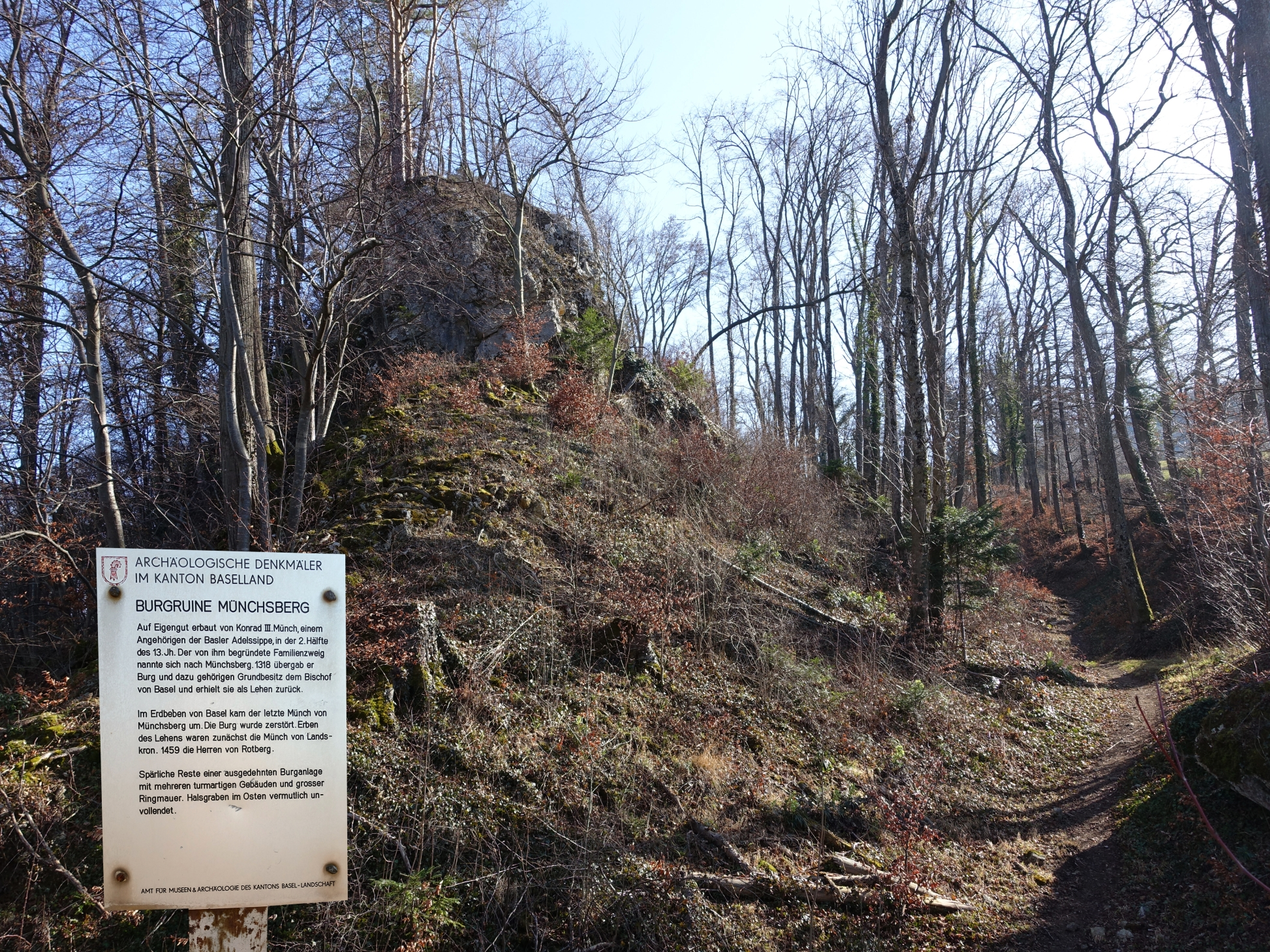 Ruine Münchsberg, Aesch, Basel Land, Schweiz